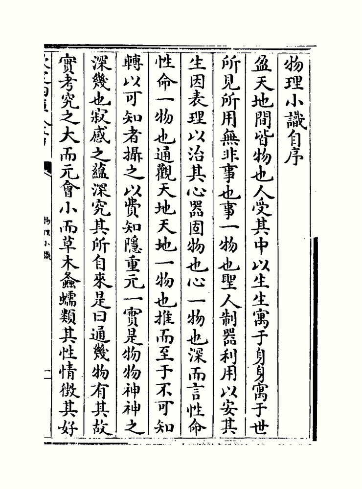 方以智物理小识